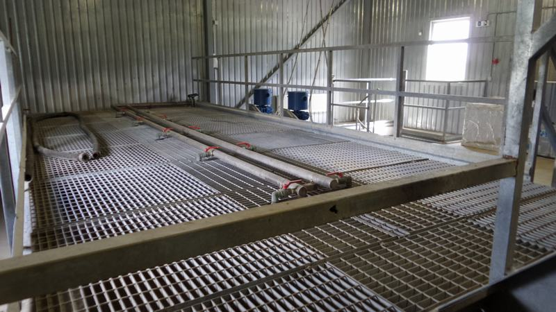 Jõgeva reoveepuhasti liivapüünis